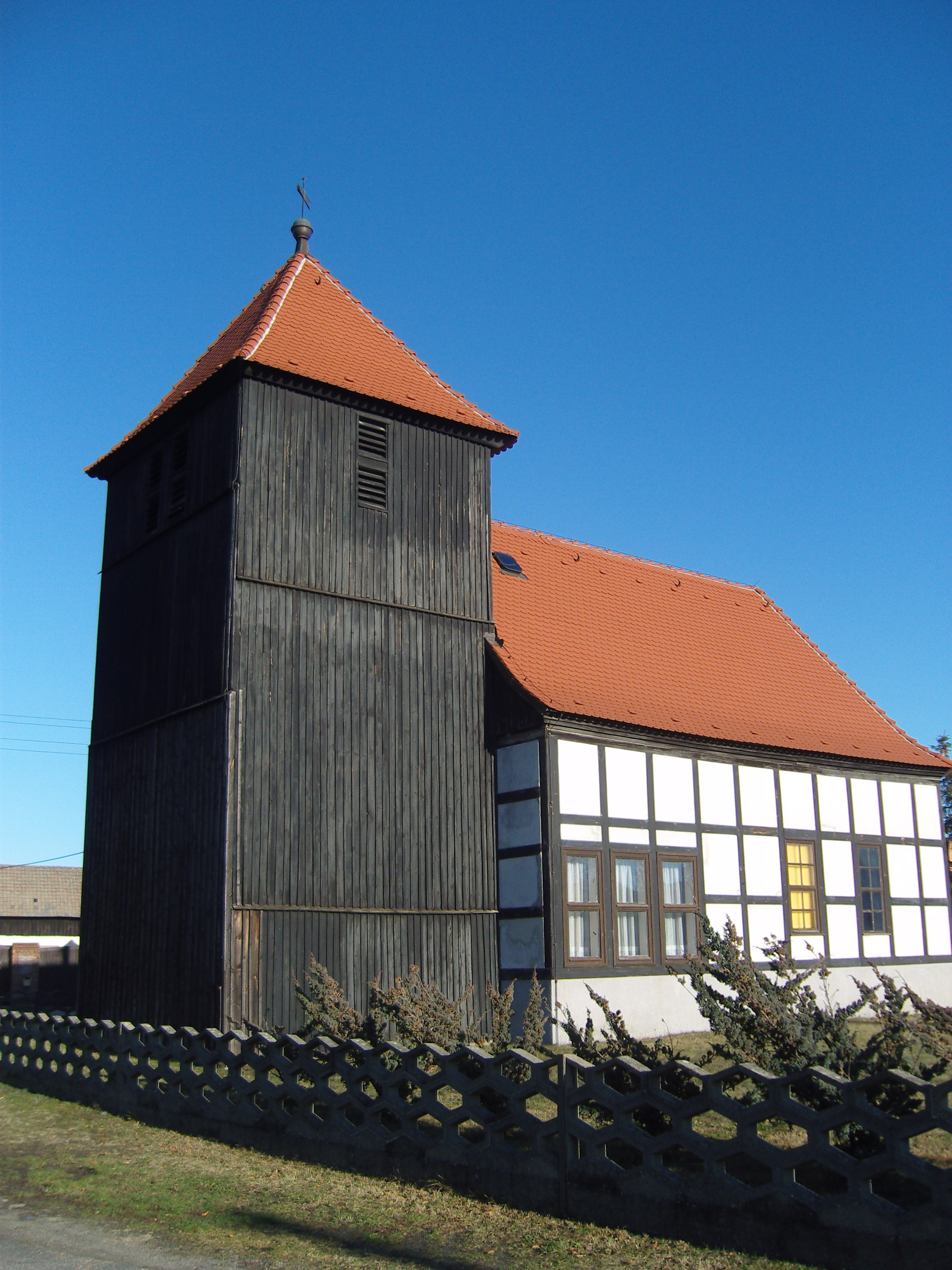 Dorfkirche Lieske